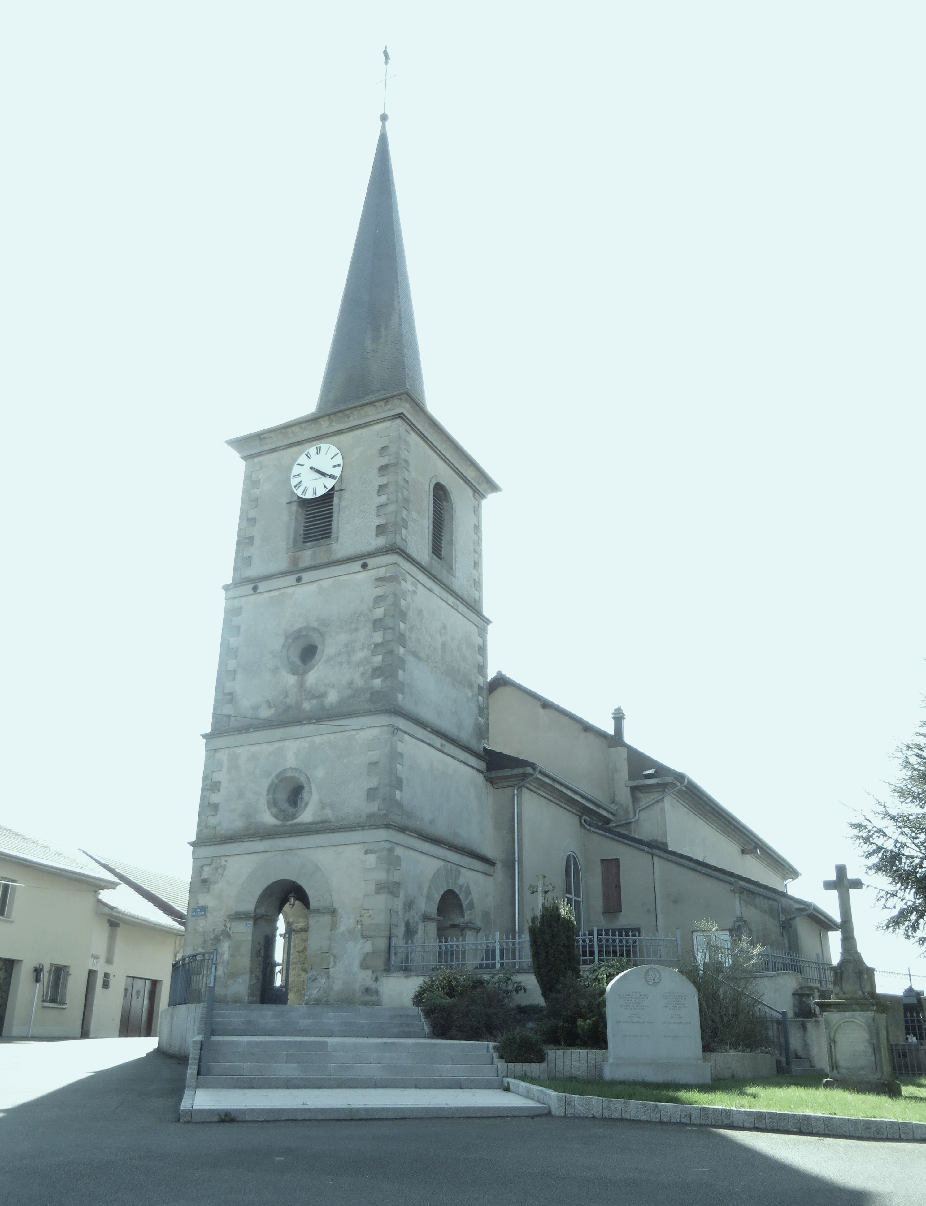 Bistroff Église Saint-Maurice